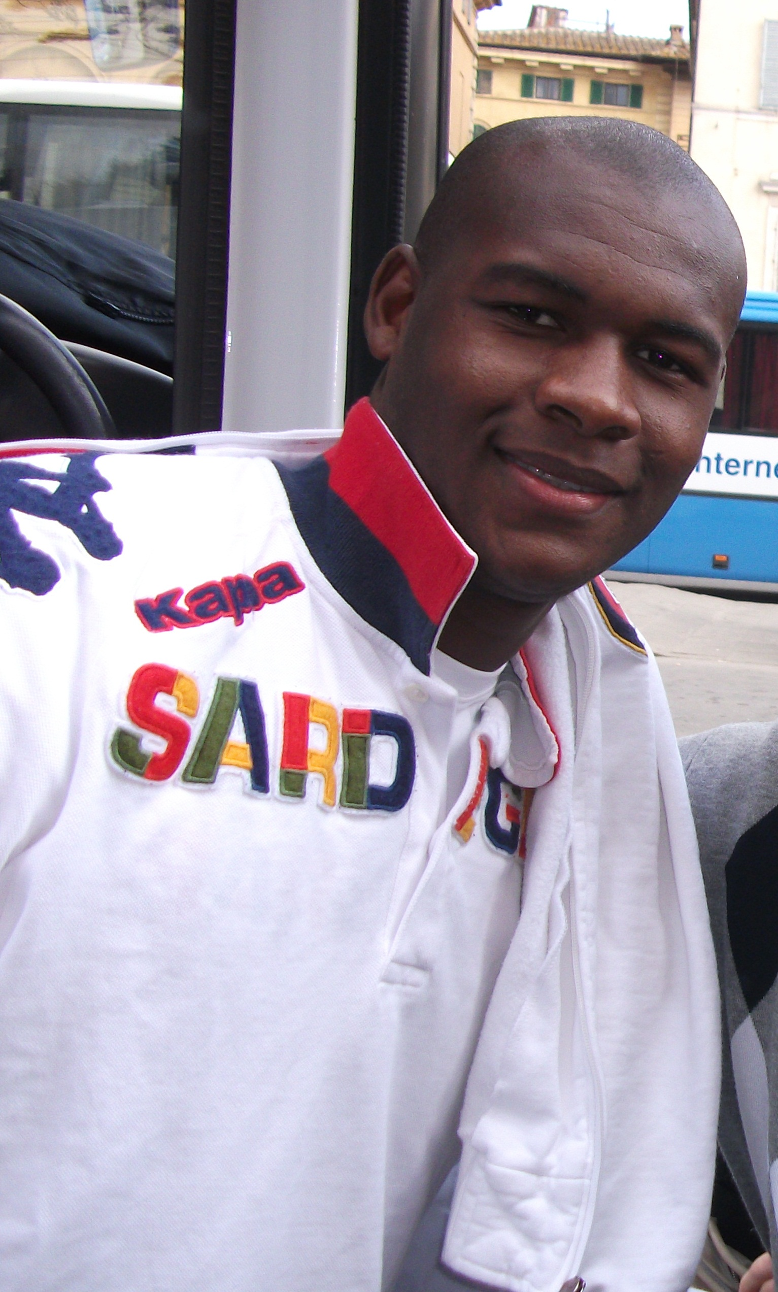 Víctor Ibarbo prima della partita di Serie A, Siena - Cagliari del 4 marzo 2012.